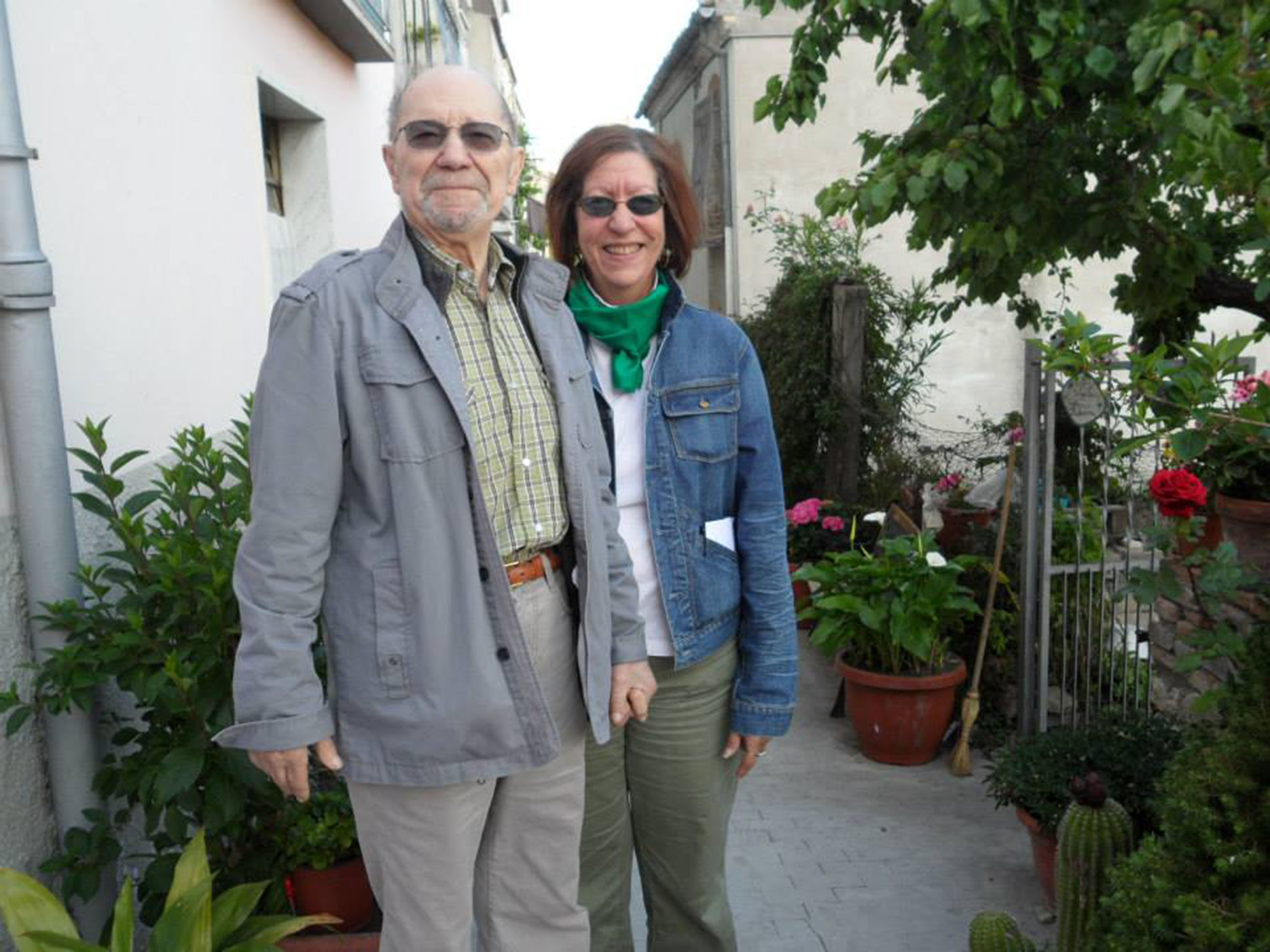 Giose Rimanelli con Sheryl Lynn Postman, Casacalenda, Molise, Italia